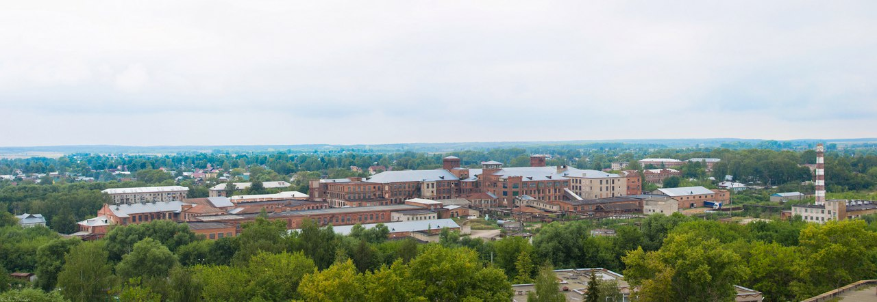 Фурмановская прядильно-ткацкая фабрика № 2